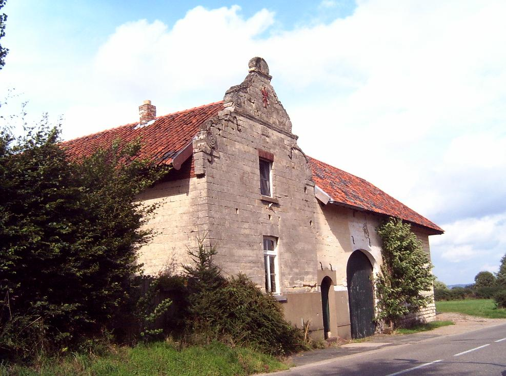 Ouwe mergele haof in Termaar foto: Els Diederen 2006 Aelske